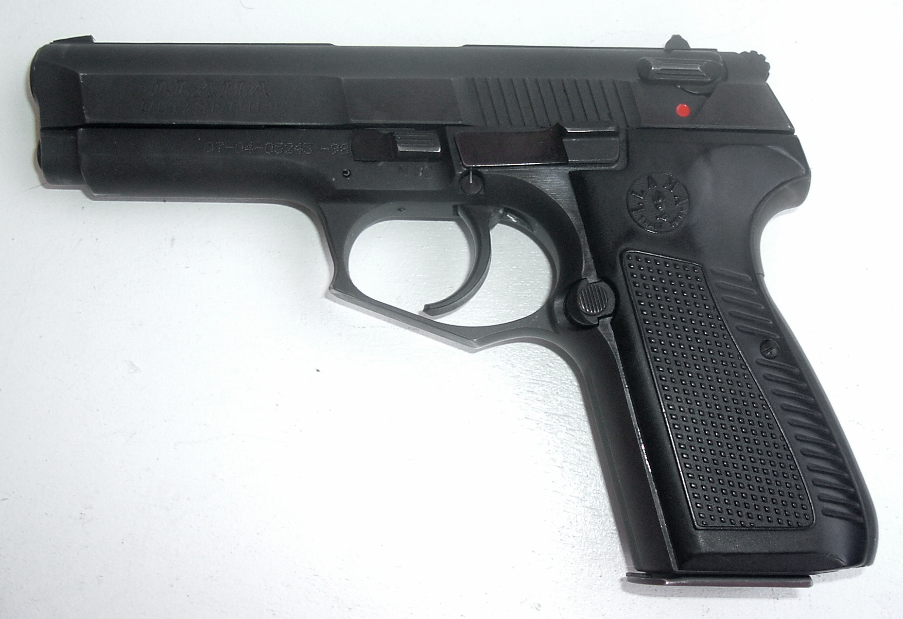 spanish semi-automatic pistol Llama M82